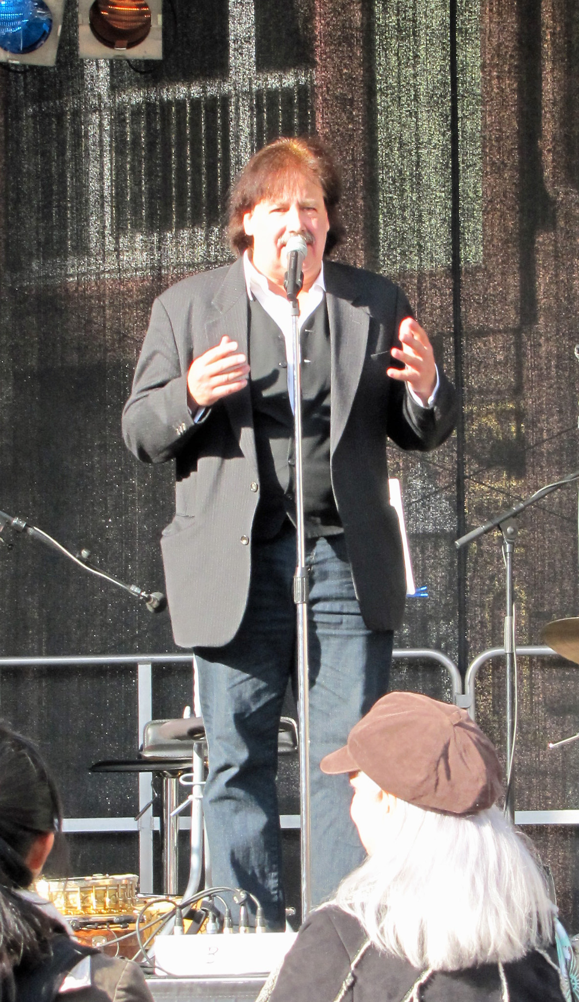 Christoph Oeser bei "Jazz zum Dritten" 2013, auf dem Römerberg in Frankfurt am Main.